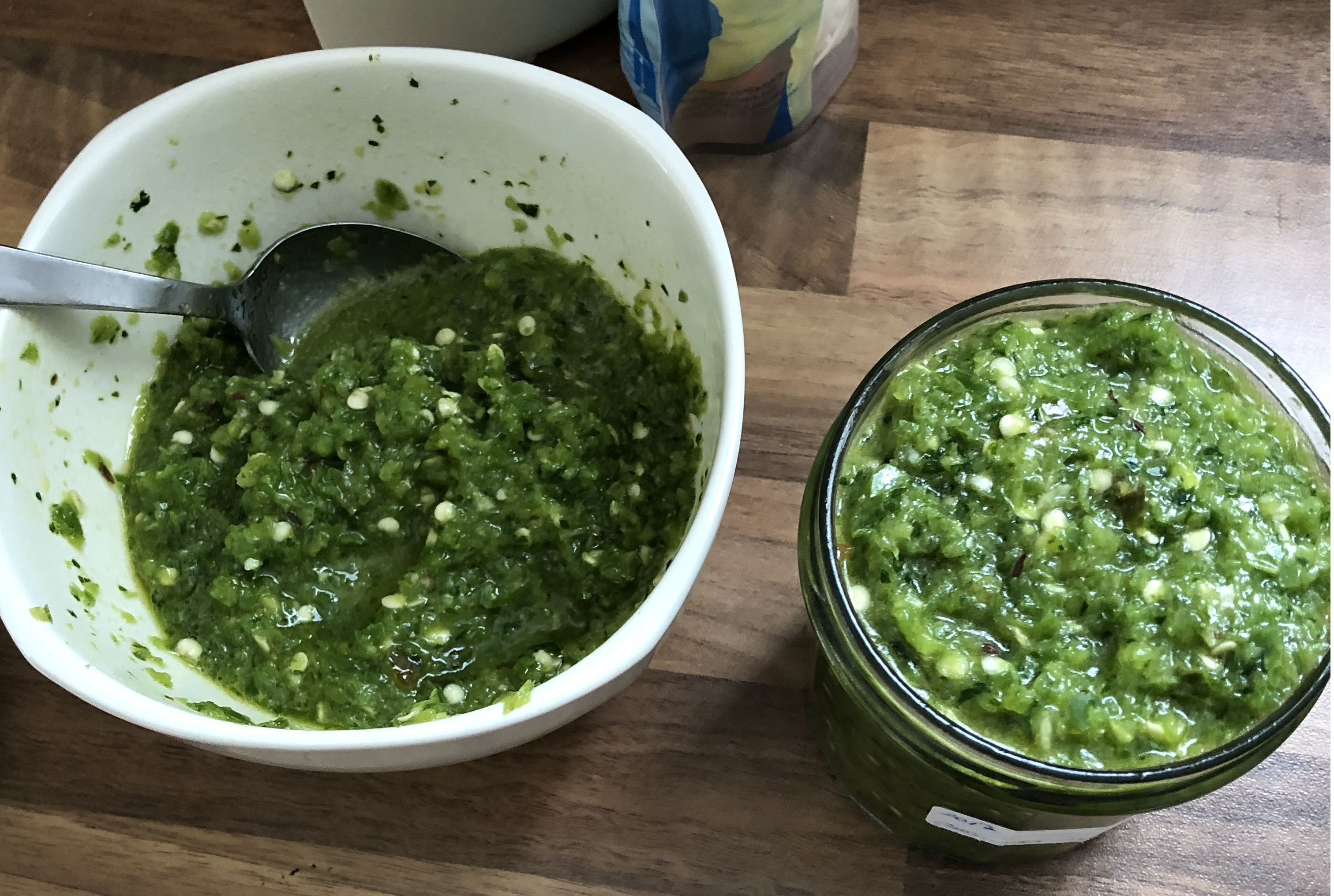 Zkhoug vert